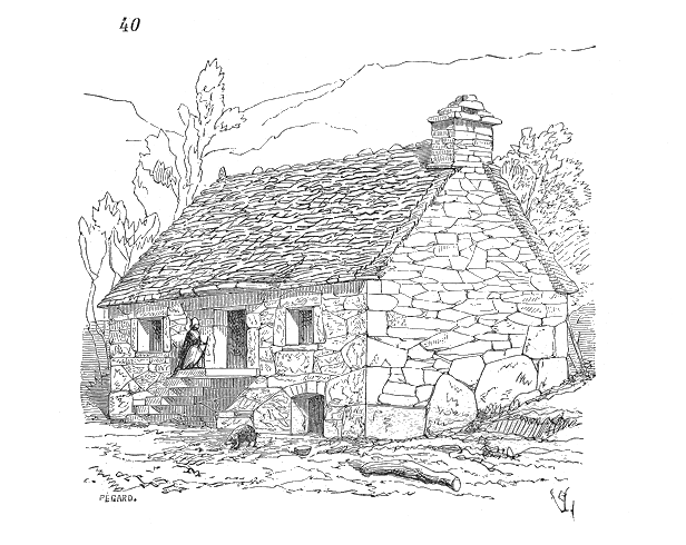 ... Dans le Morvan, la vieille maison du paysan ne présente à l'extérieur qu'une masse de pierres amoncelées. Des murs élevés en gros blocs de granit percés de petites ouvertures, un rez-de-chaussée très-bas, servant de cellier, de dépôt, de poulailler ou de porcherie. Porte élevée d'un ou deux mètres au-dessus du sol avec escalier et palier engagé dans la muraille; plafond formé de grosses poutres avec solivage. Grenier au-dessus protégé par une lourde charpente couverte en plaquettes de pierres appelées laves dans le pays (40) ...